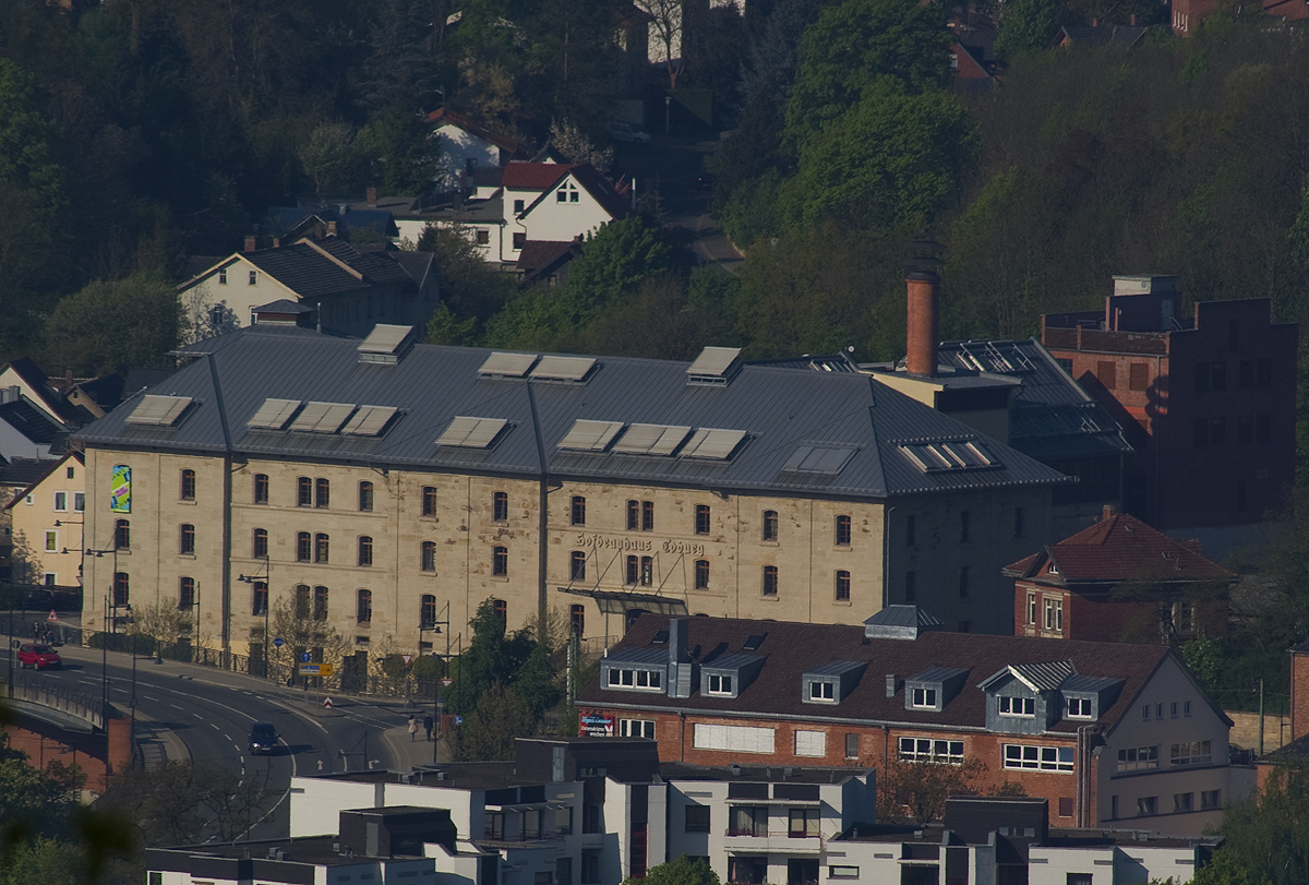 Hofbräuhaus in Coburg, Bayern. Von der Veste aus gesehen.